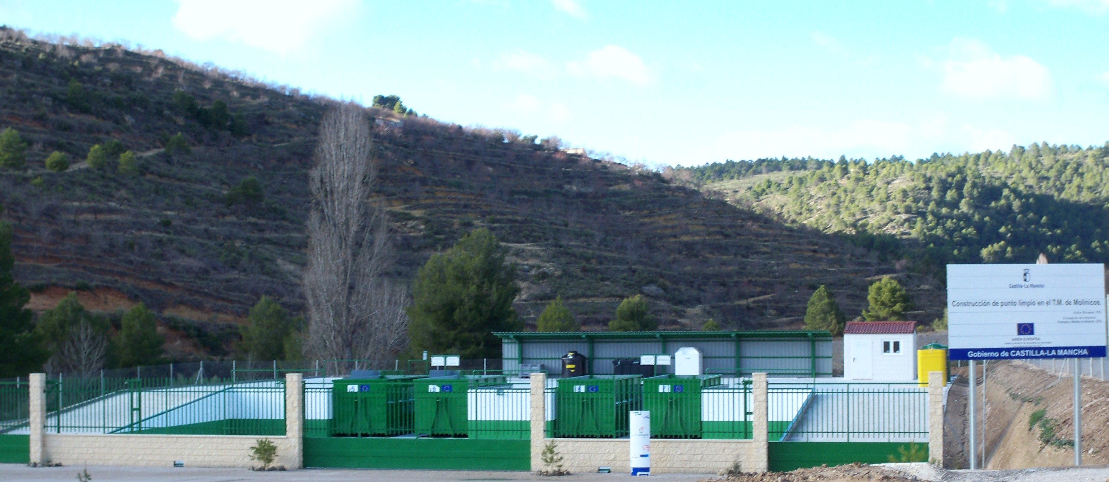 Fotografía del punto limpio de Molinicos (Albacete)